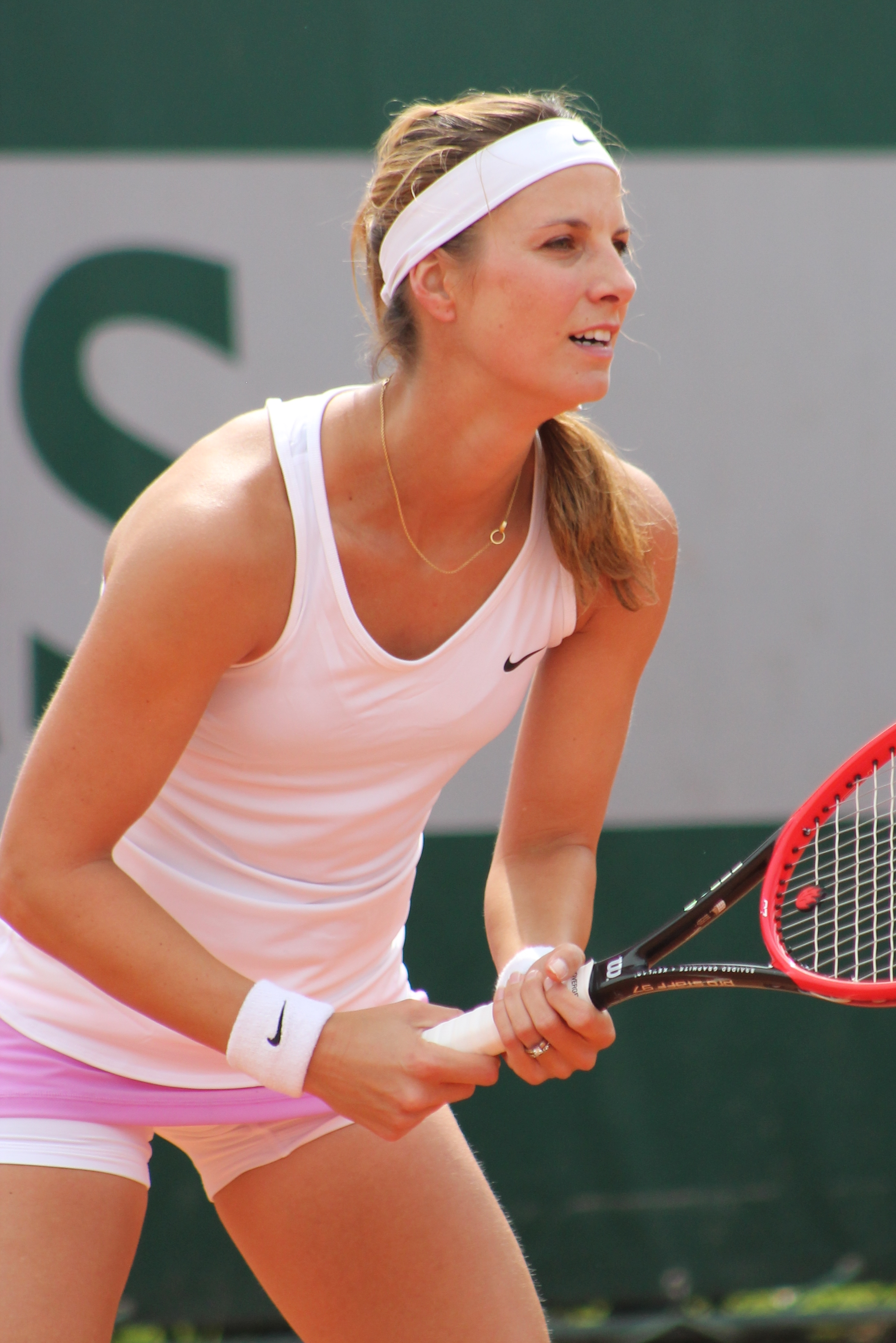 Minella RG15 (3)